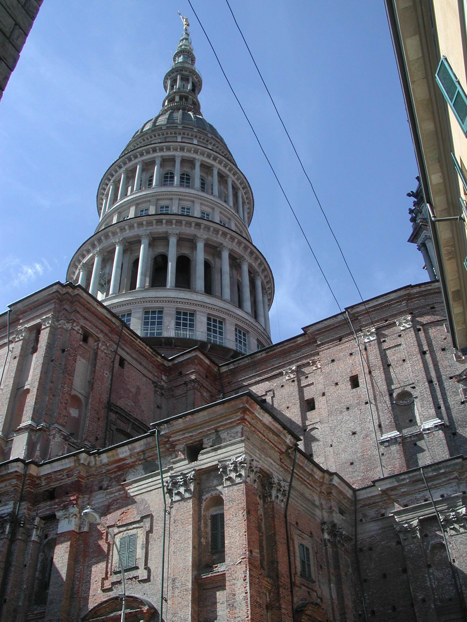 Novara, Italy, basilica di San Gaudenzio (Novara)